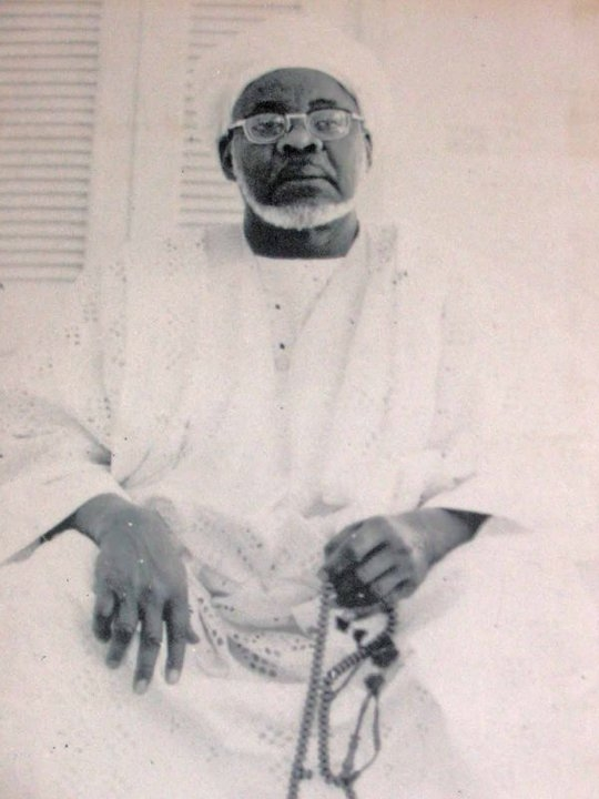 Cheikh Ibrahim Niass